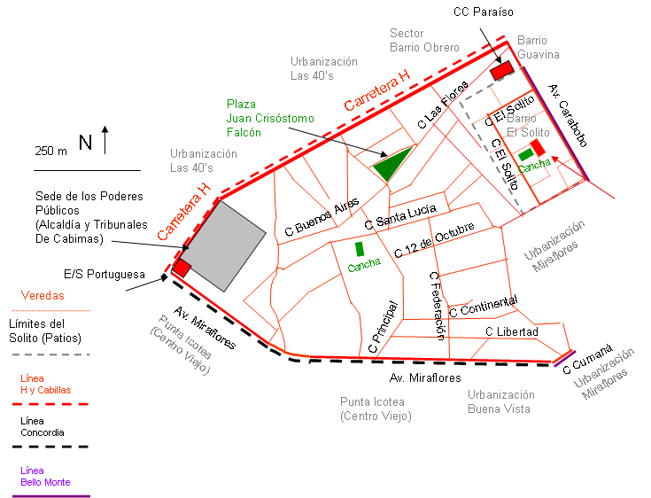 Mapa del barrio Tierra Negra. Cabimas. Zulia. Venezuela